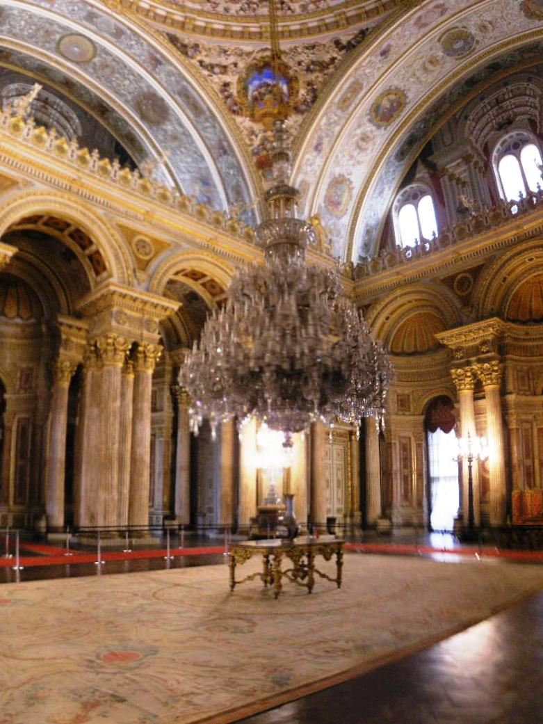 Ceremonial Hall (Muayede Salonu) in Dolmabahçe Palace